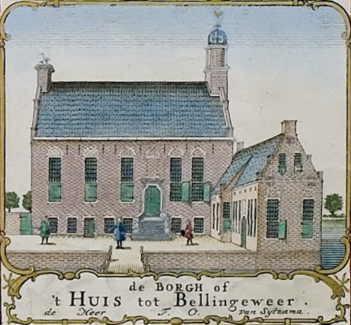 Tammingaborg in Bellingeweer. Uitsnede uit de kaart van Theodorus Beckeringh uit 1781. Wohnsitz der Familie van Sytzama